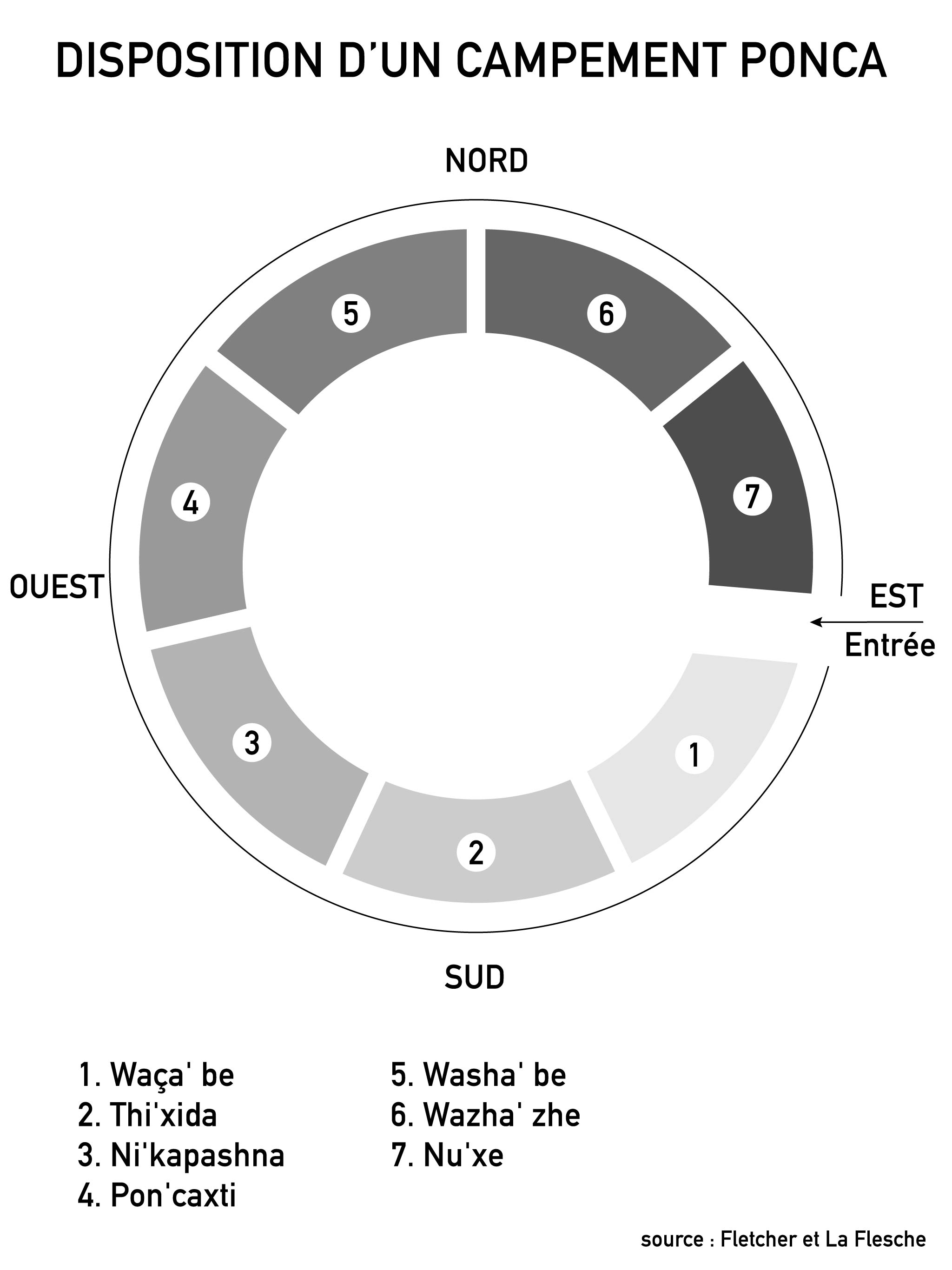 Disposition d'un campement ponca selon Fletcher et La Flesche (Omaha Tribe, p.42)